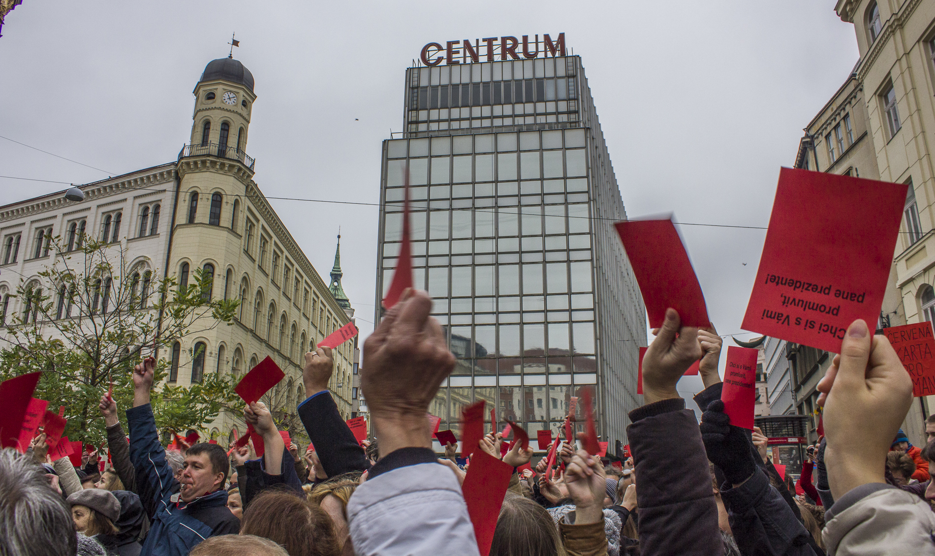 Zvedání červených karet pro prezidenta Miloše Zemana. Z události svolané na Facebooku: "Dne 17. listopadu v 11:00 pořádáme happening na Malinovského náměstí v Brně. Na něm připomeneme "fauly" pana prezidenta Miloše Zemana symbolickým pozvednutím červených karet. Máme dva cíle. Prvním je vyjádřit nesouhlas s tím, jakým způsobem nás zastupuje a reprezentuje pan prezident a upozornit na možné neblahé dopady jeho počínání. Za druhé chceme spojit lidi a inspirovat je ke korektní a slušné diskuzi o současném stavu naší republiky. Zároveň bude probíhat podpis petičních archů "Manifestační petice pro odstoupení prezidenta Miloše Zemana". Akce je inspirována happeningem v Praze,(...)"